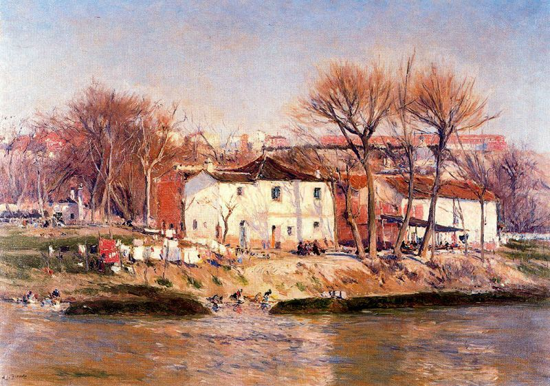 Pintura de Paisajes y vistas